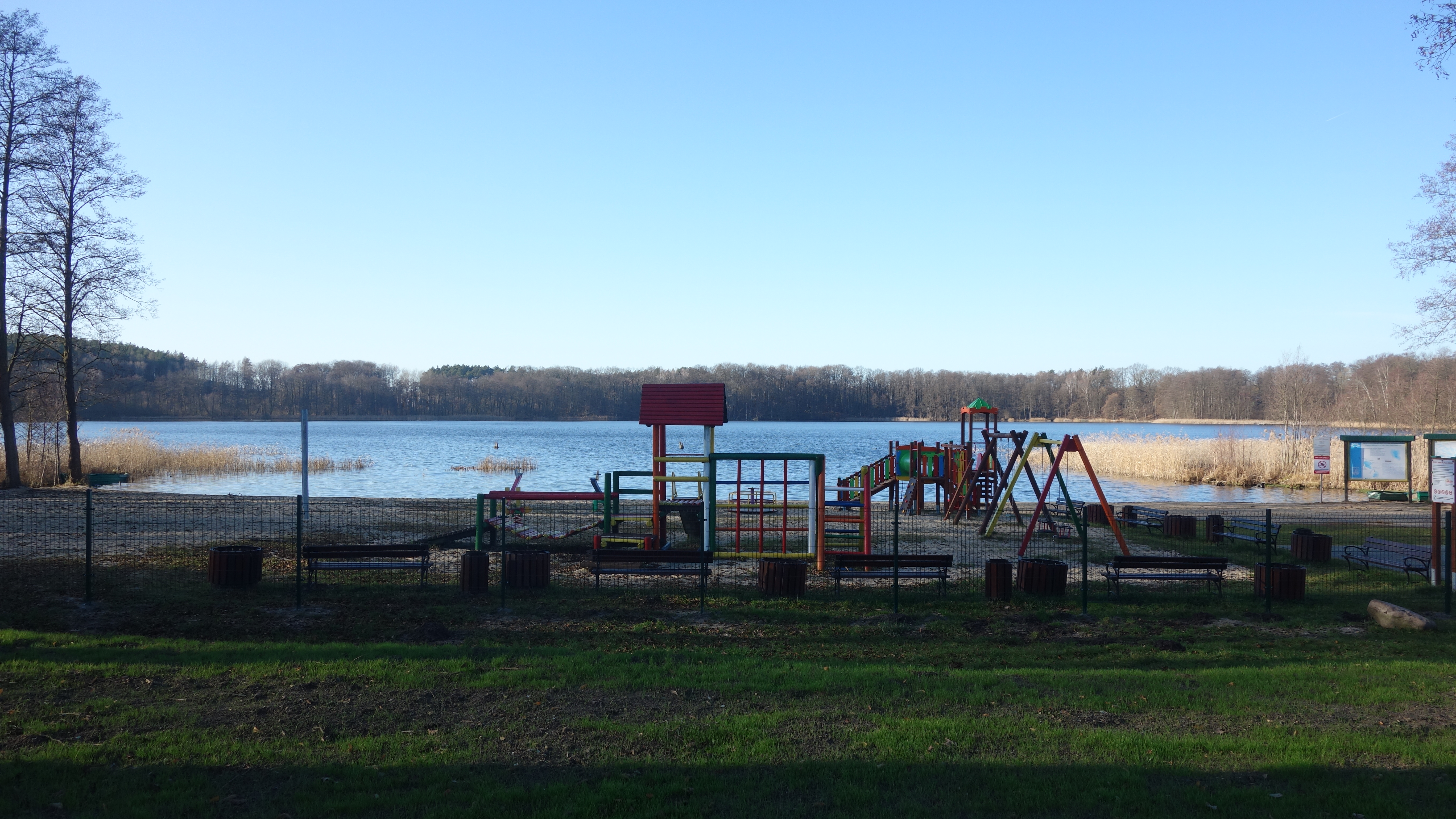 Plaża nad Goszczą w 2020 roku